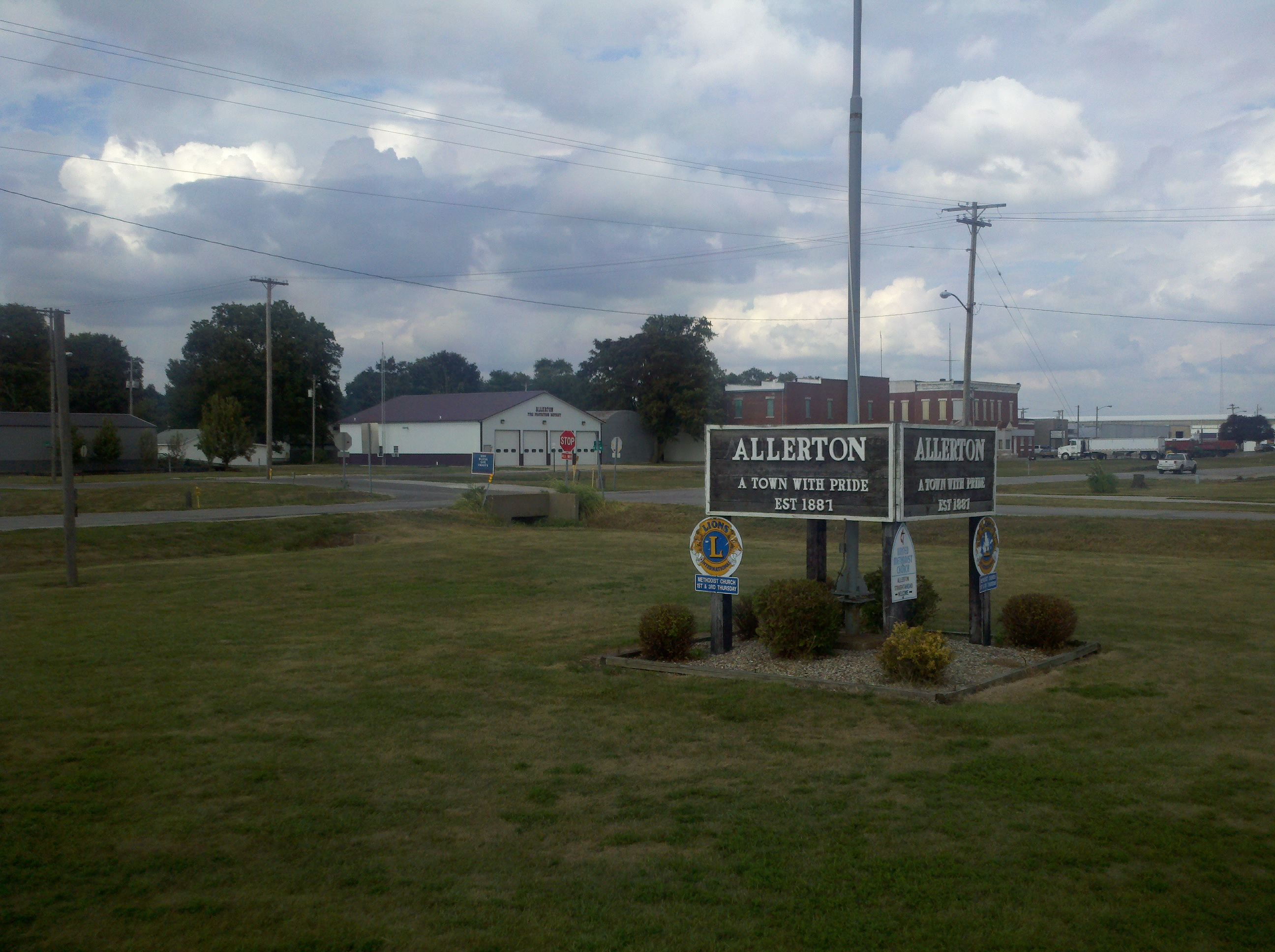 Welcome sign in Allerton, Illinois